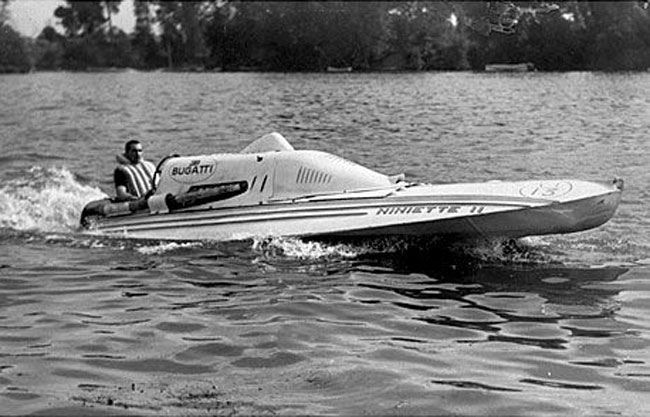 Bateau de course Bugatti Niniette II du Prince Ruspoli